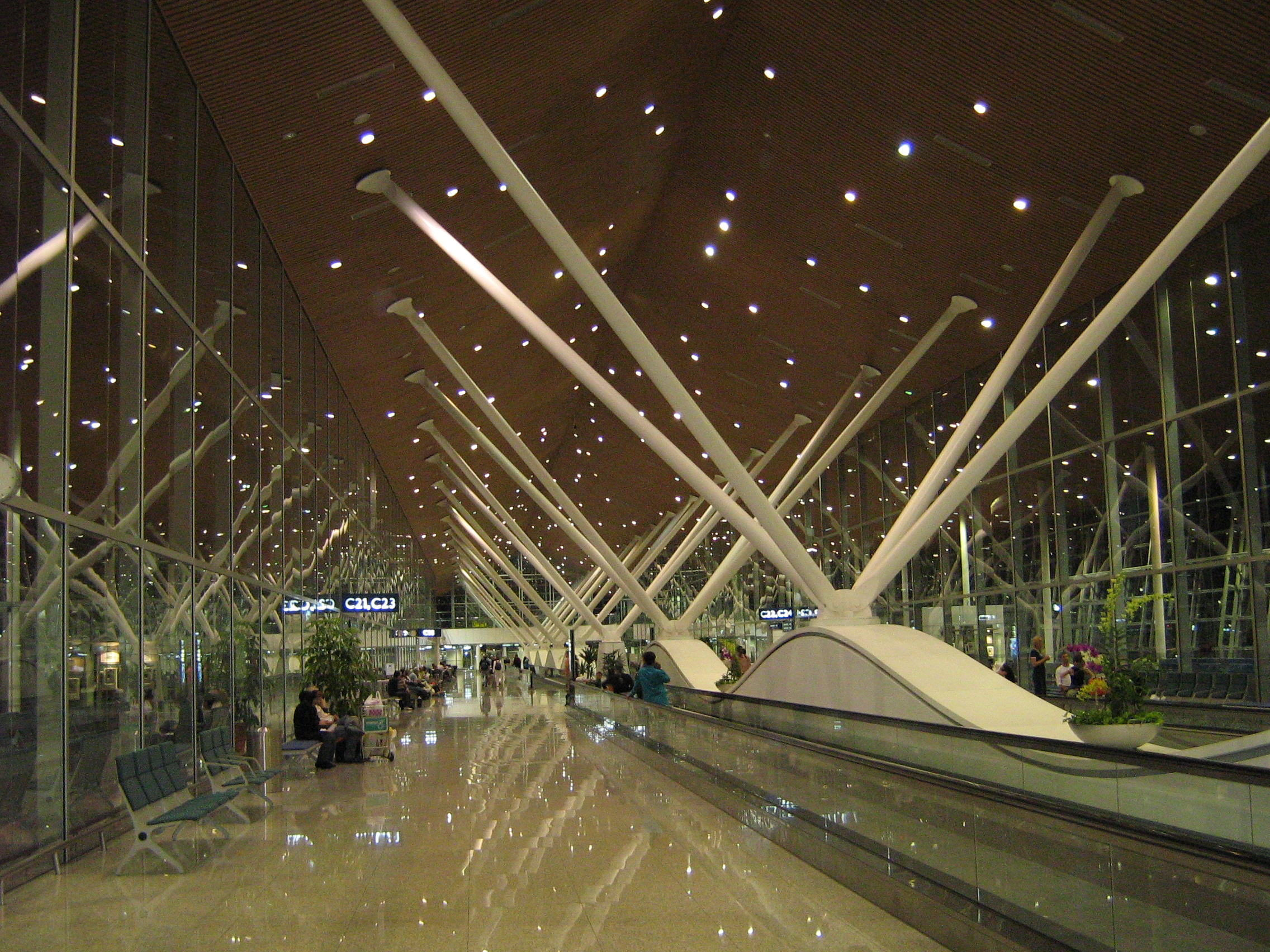 Satellit in KLIA